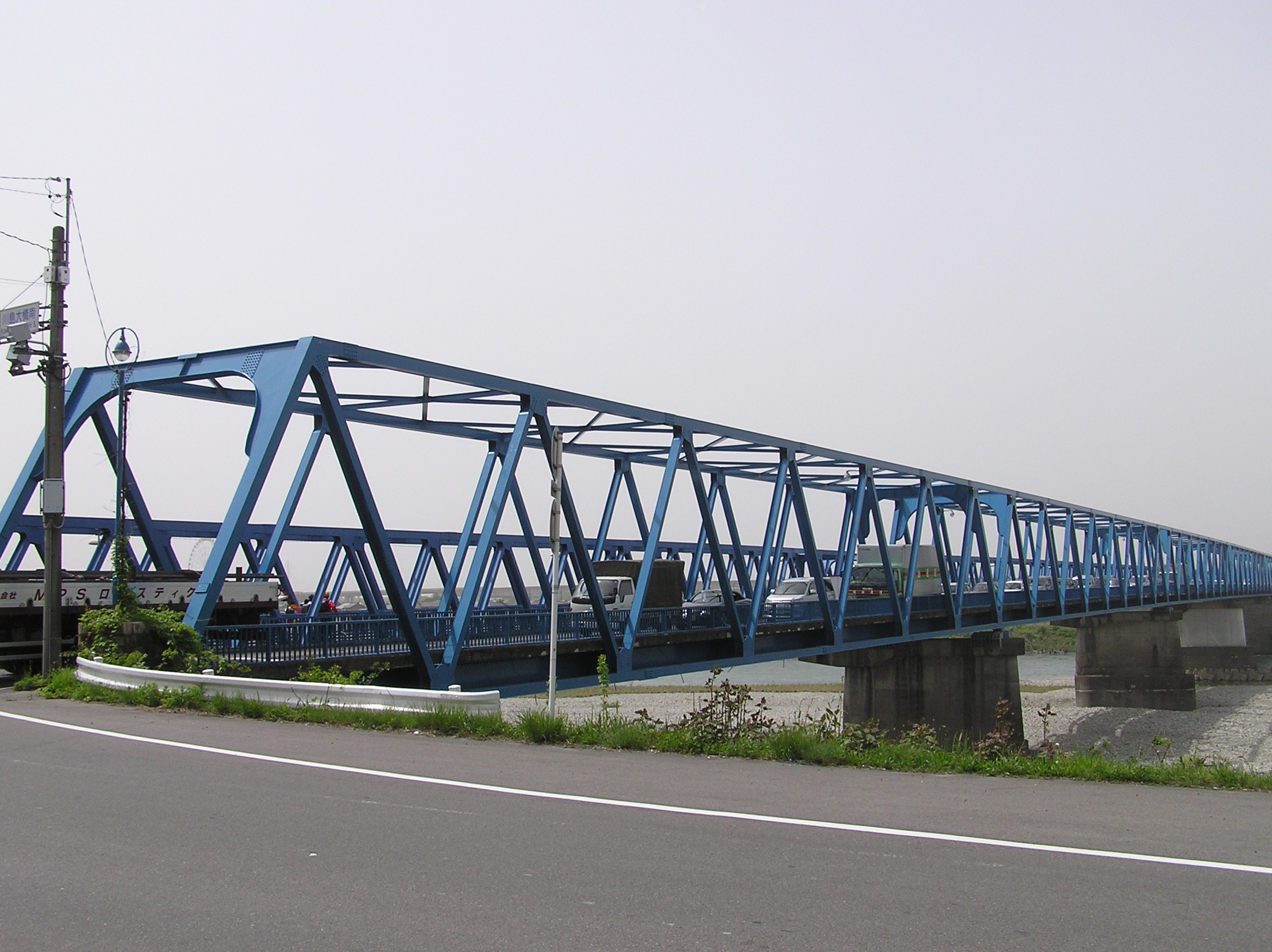 川島大橋(岐阜県各務原市)